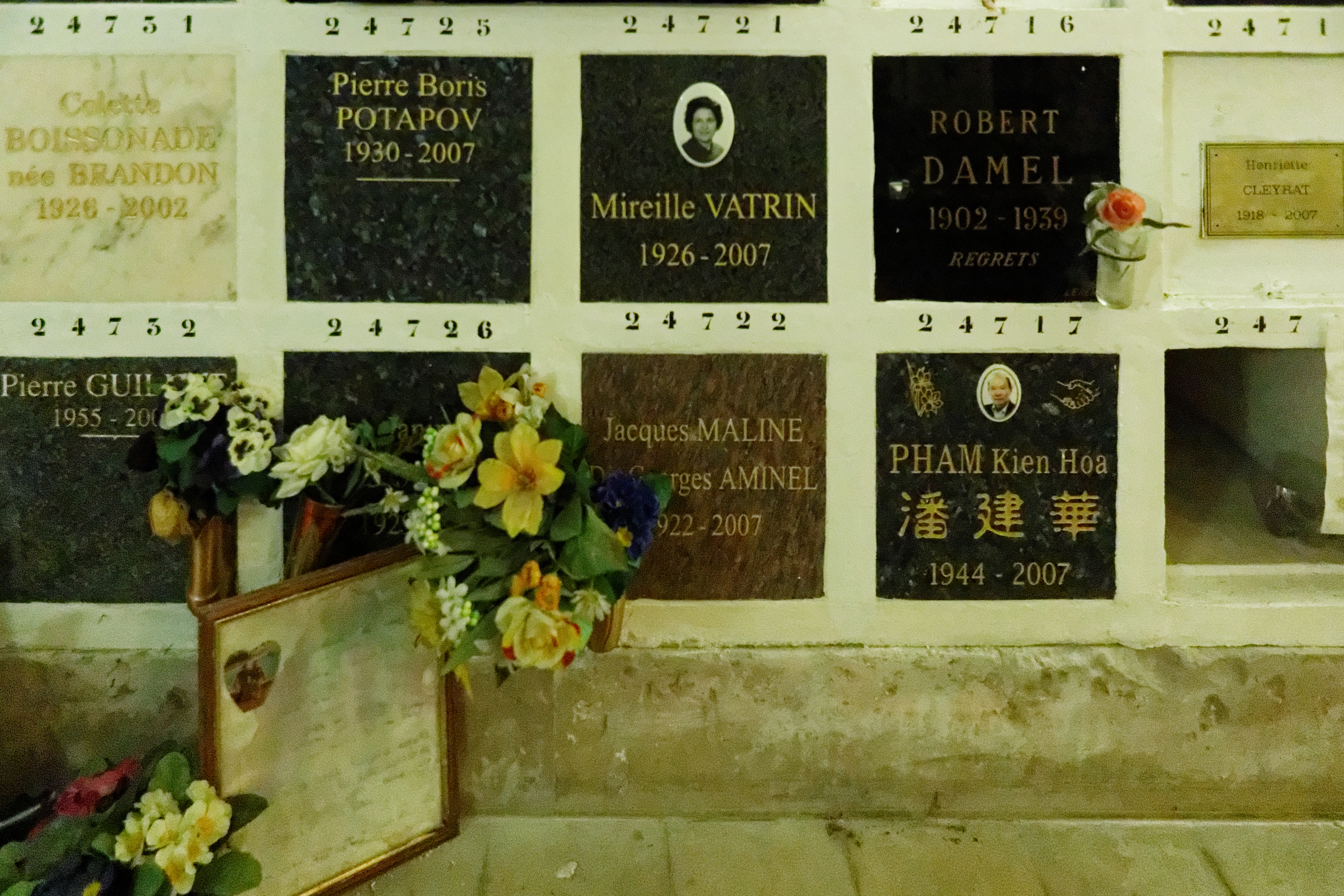 Cases du columbarium du cimetière du Père-Lachaise.